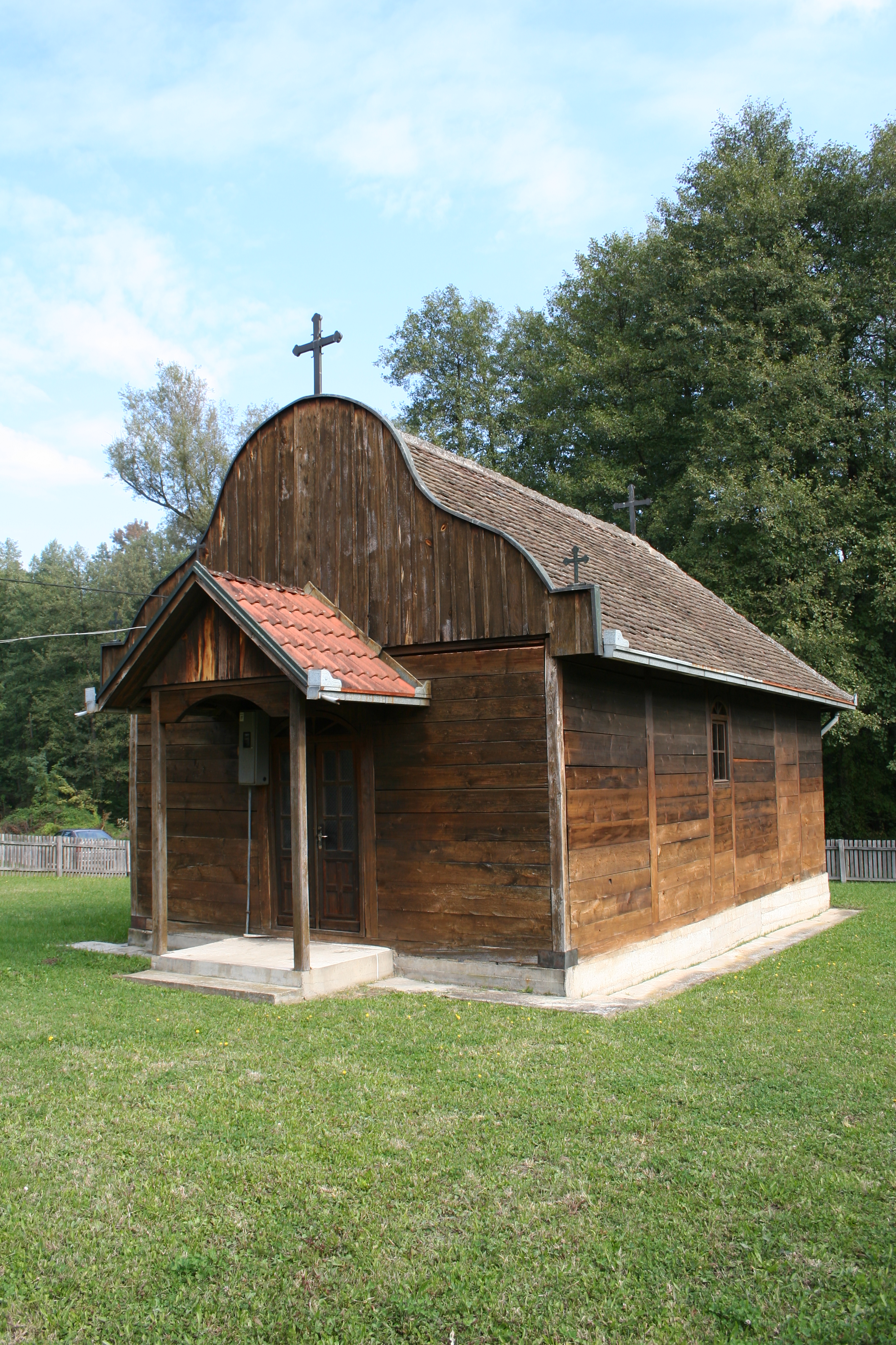 Crkva brvnara u Orašcu